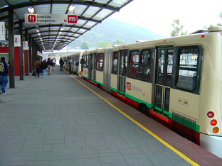 Metrobús